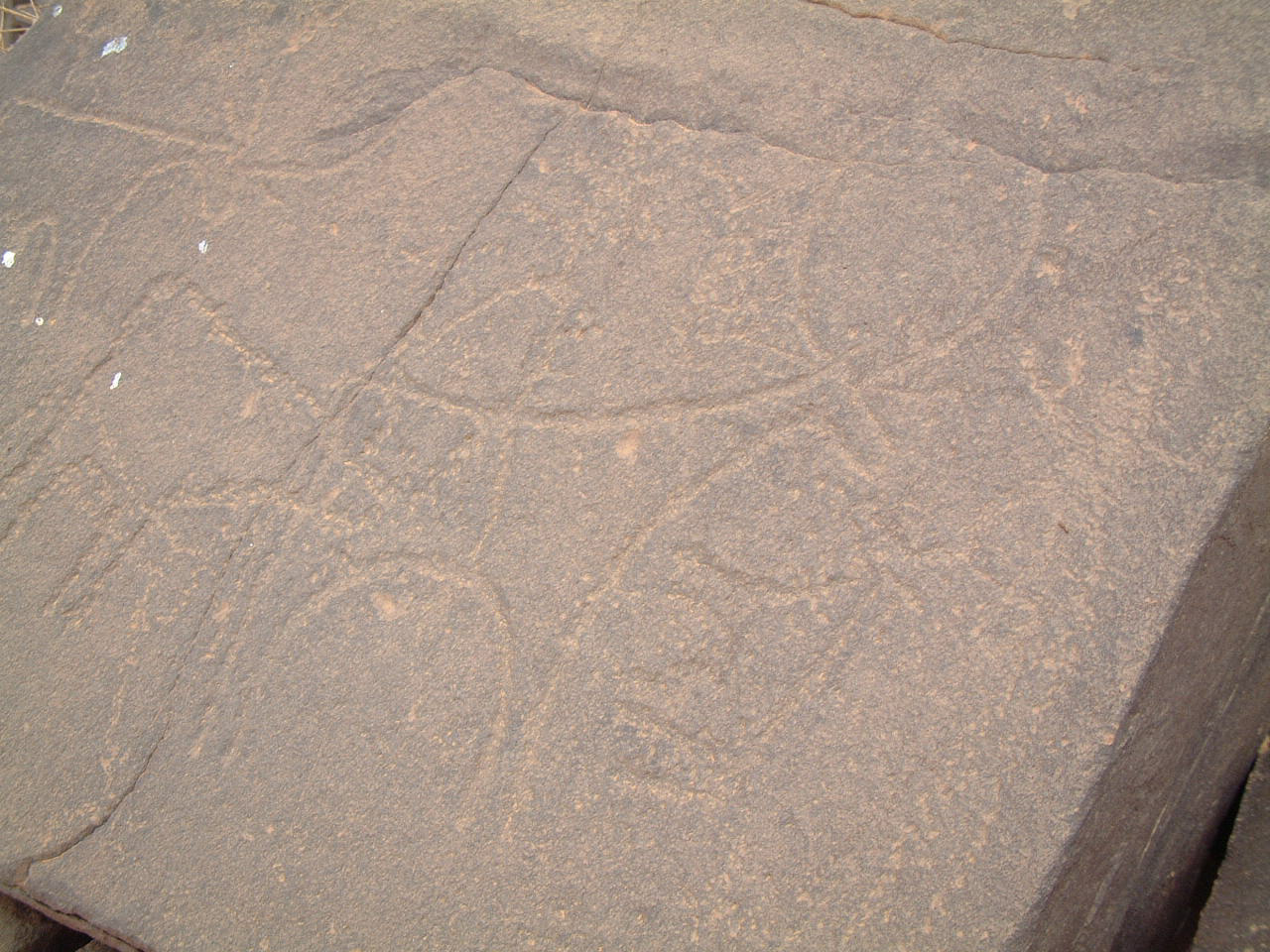 Auteur: Taguelmoust Essouk, gravure rupestre estimée à - 6 000 ans av. J.-C. GFDL Taguelmoust janvier 2003